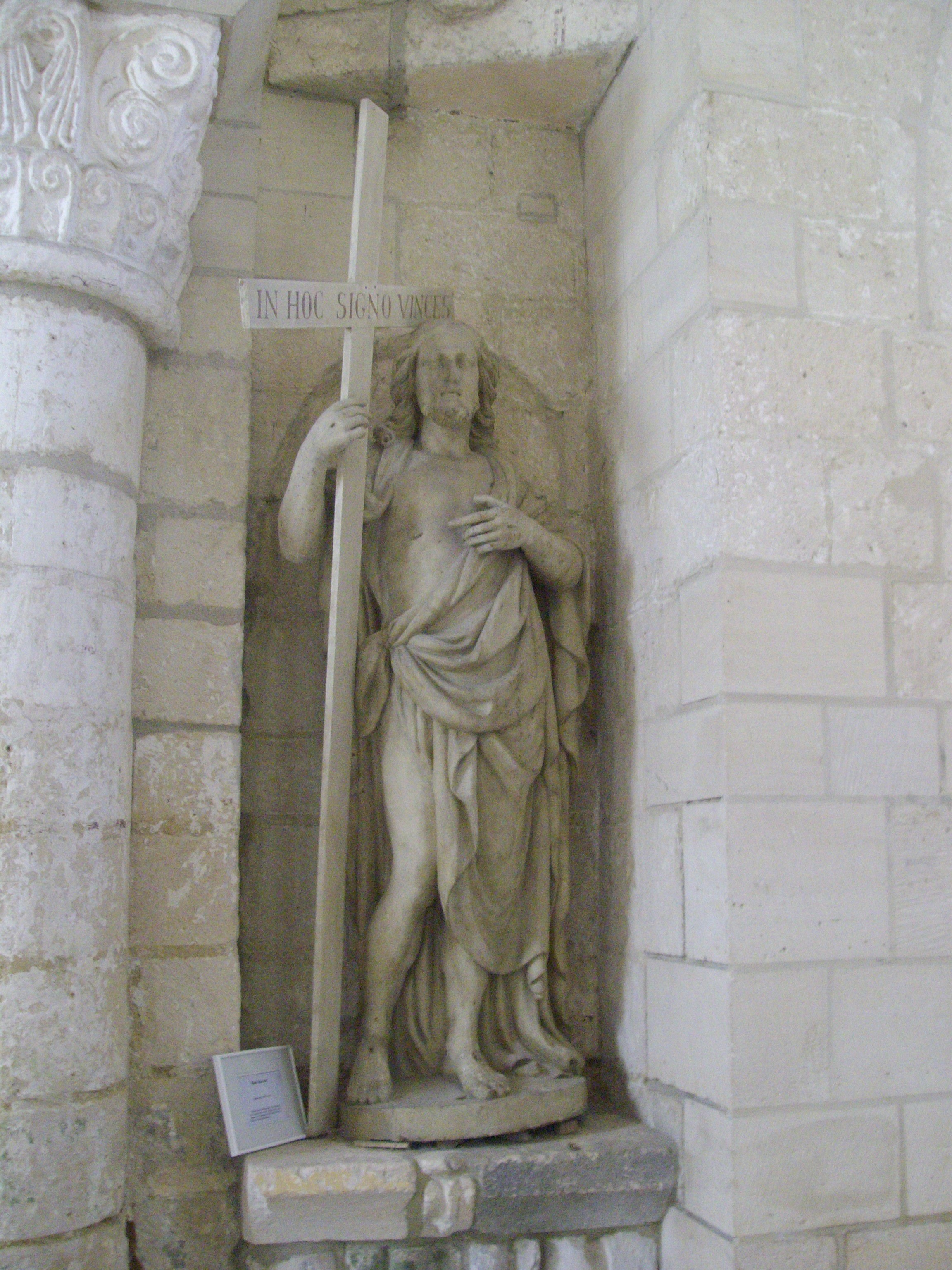 Sculpture en bois de saint Sauveur, XVIIe siècle, dans l'abbaye Notre-Dame de Morienval